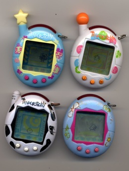 Tous mes tamagotchi,v2/v3/v4 et v4.5 Caractères: V2: oniotchi fille v3: mimiyoritchi(la pile est trop fine et n'a pas tenue quand j'y ai passé sur le scanner) v4: young memetchi v4.5: ura yattatchi